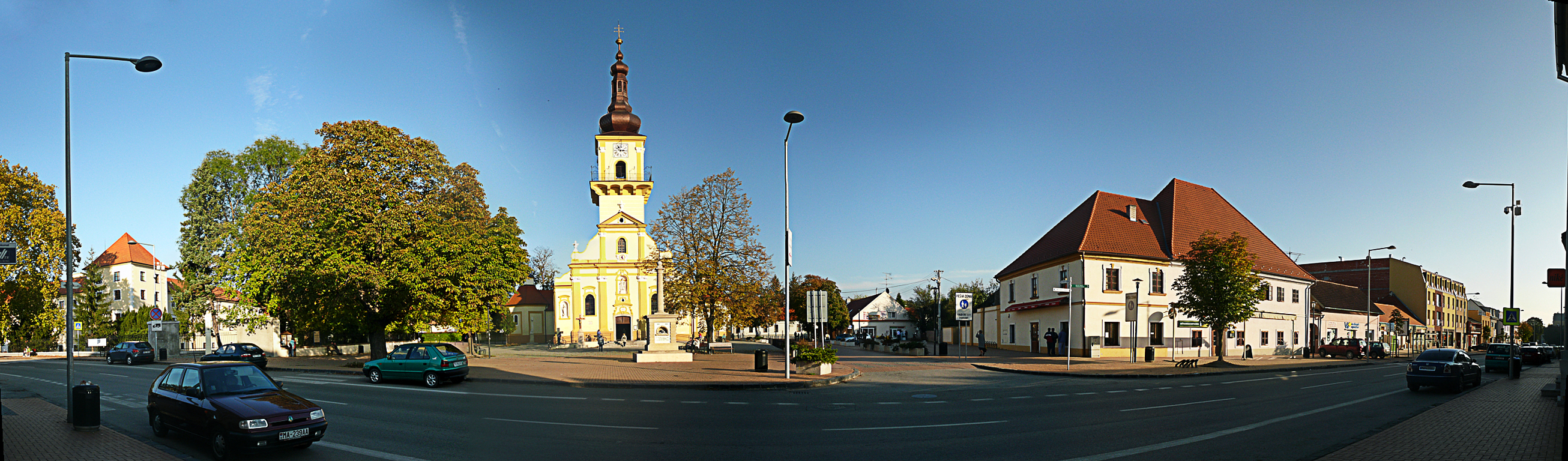 Námestie sv. Trojice v Stupave NOTE: This image is a panorama consisting of multiple frames that were merged in software. As a result, this image necessarily underwent some form of digital manipulation. These manipulations may include blending, blurring, cloning, and color and perspective adjustments. As a result of these adjustments, the image content may be slightly different than reality at the points where multiple images were combined. This manipulation is often required due to lens, perspective, and parallax distortions.